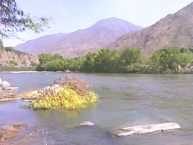 YATAHUAL- RIO JEQUETEPEQUE